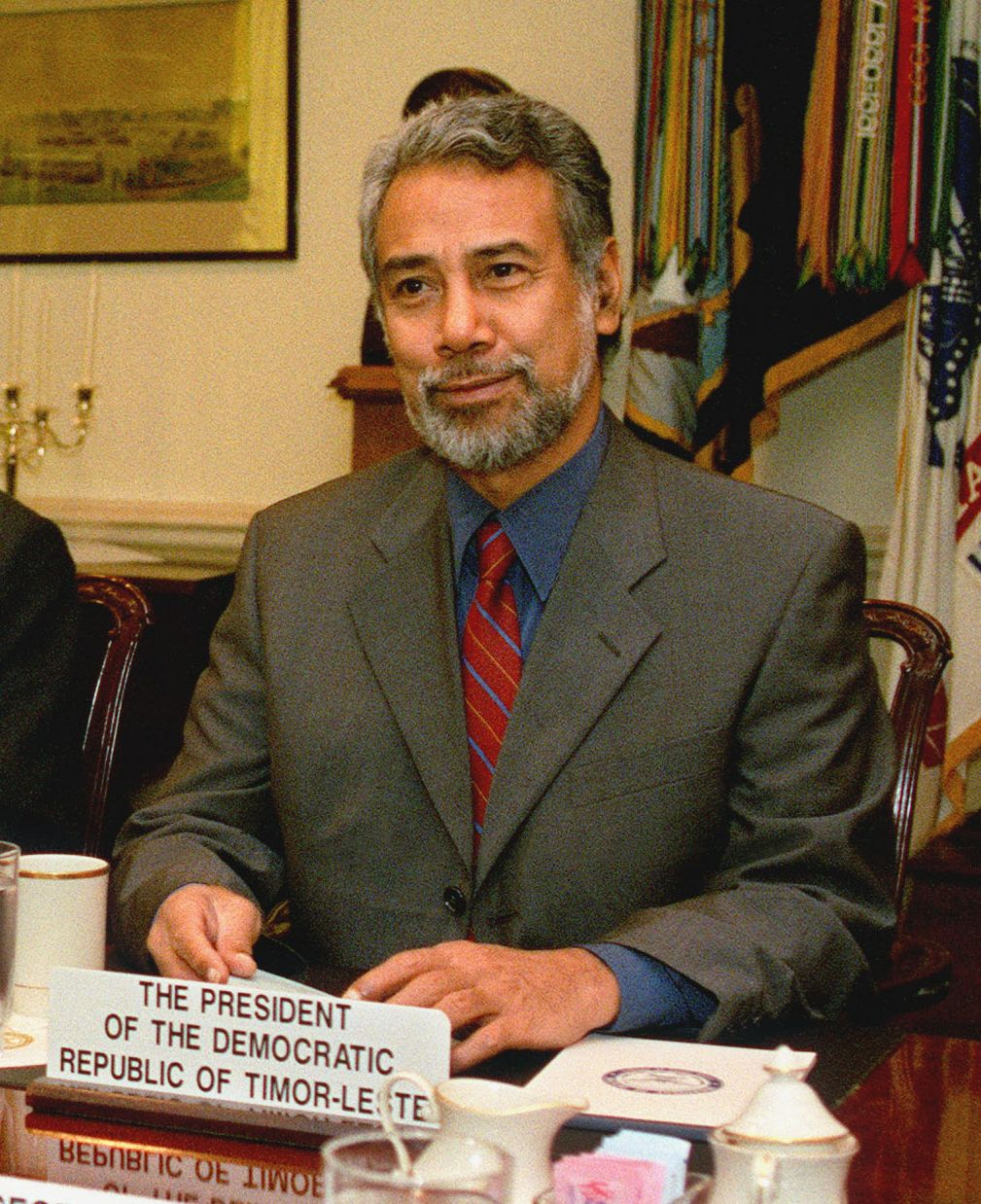 President José Alexandre Gusmão (right), of East Timor, meets with Deputy Secretary of Defense Paul Wolfowitz in the Pentagon on October 2, 2002. The two men and their staffs are meeting to discuss a range of regional security issues. ", quoted from the below source, Darwinek cropped it.